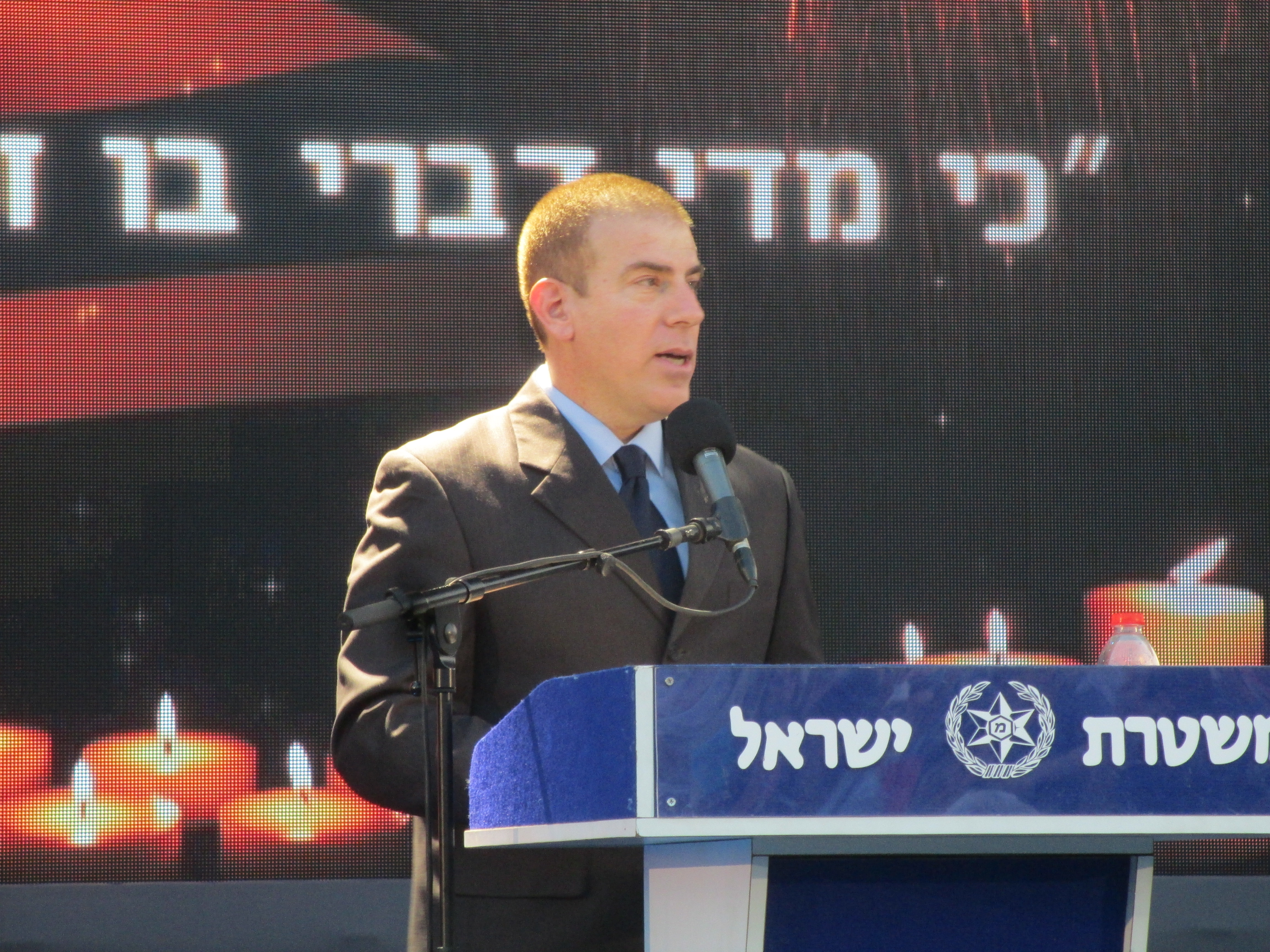 גלעד עדין בטקס אזכרה לחללי משטרת ישראל במכללה הלאומית לשוטרים בבית שמש